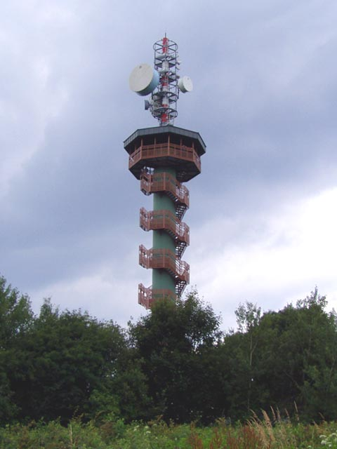 Sokoli vrch